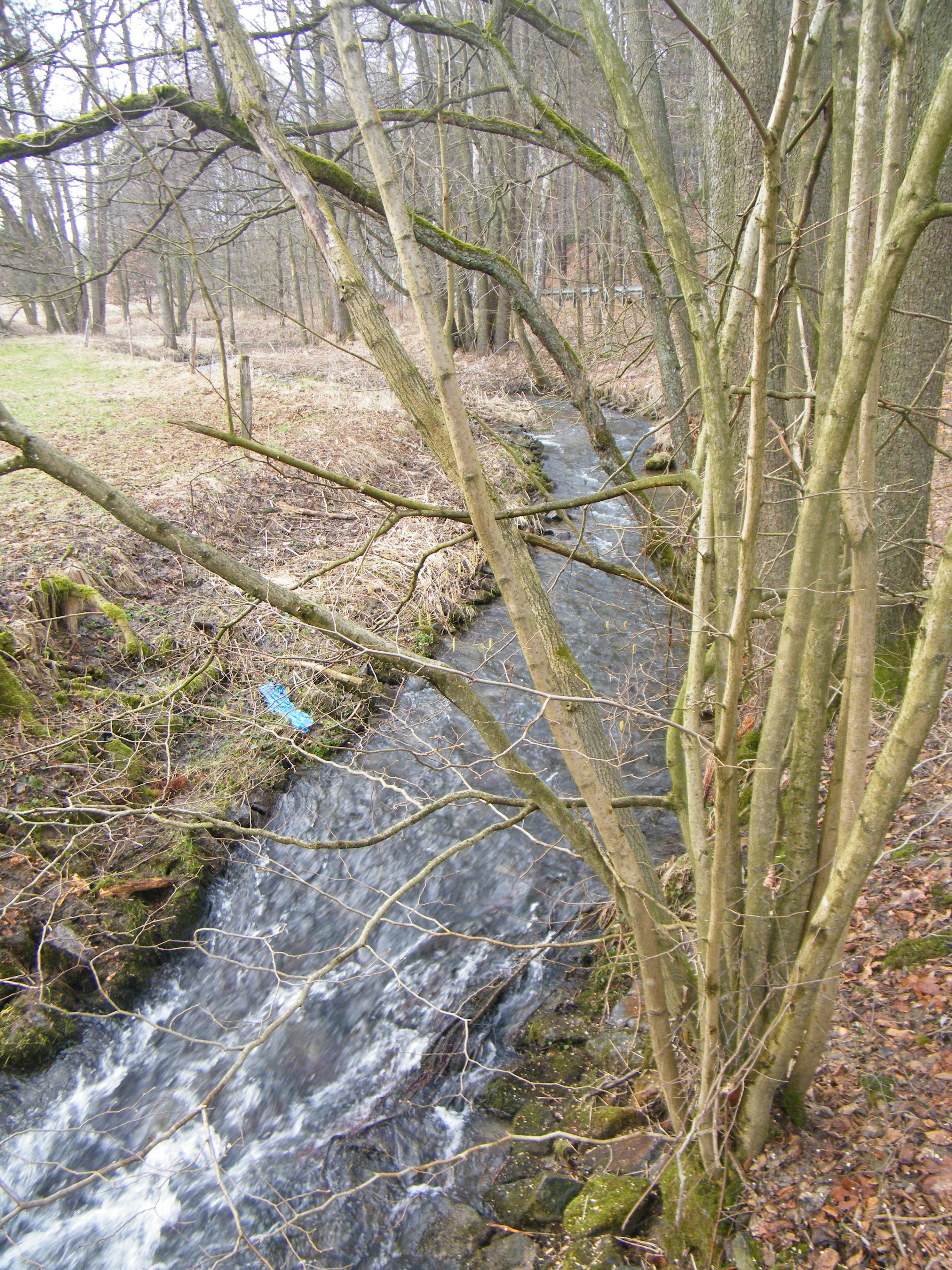 Schwarzbach, pravý přítok Sebnice, poblíž Lohsdorfu